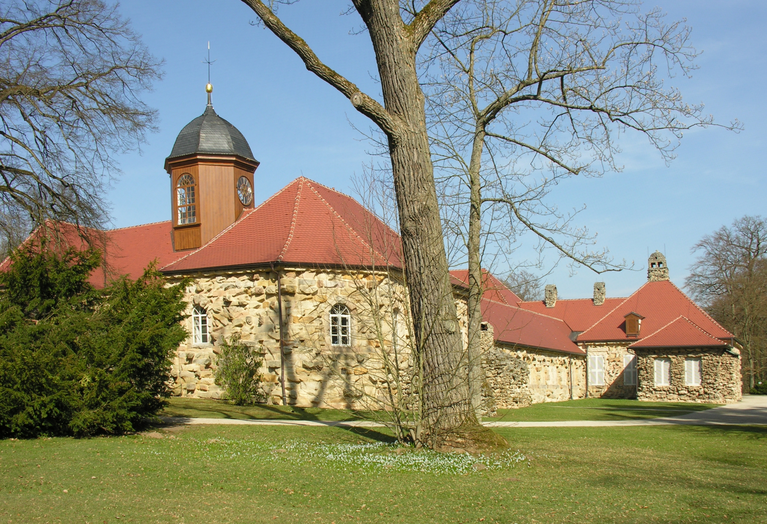 Bayreuth Eremitage Das alte Schloss 1719-22 aus Südost-Perspektive - Foto Wolfgang Pehlemann DSCN7069